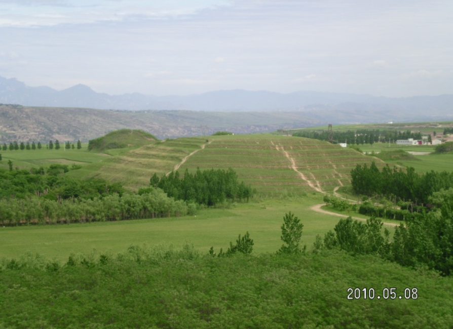 位于汉宣帝杜陵东南侧